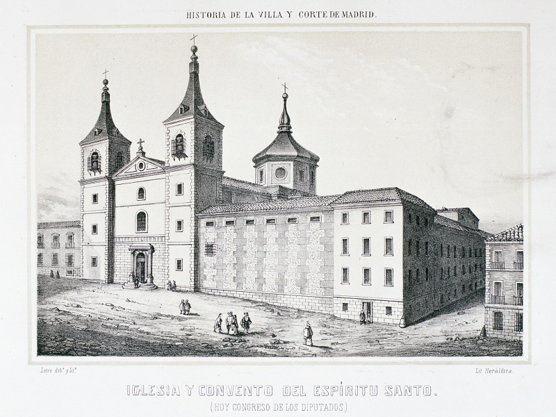 Iglesia y Convento del Espíritu Santo. Madrid. España.